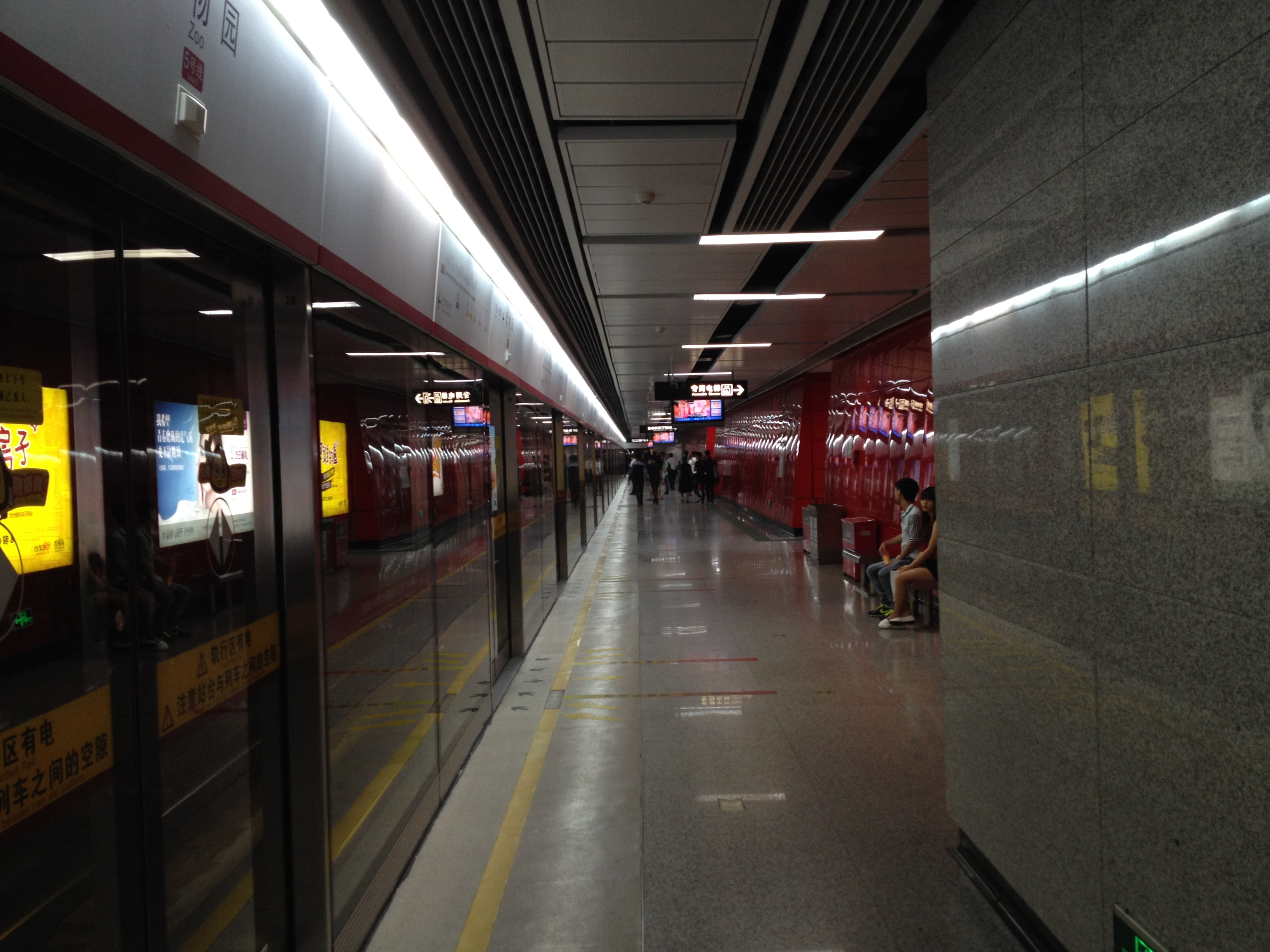 广州地铁动物园站地下三层月台